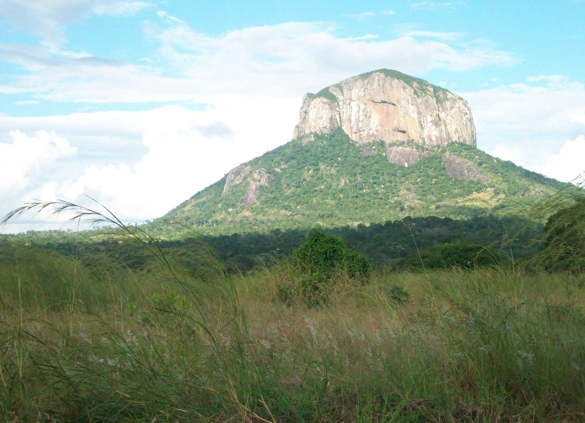 Risorse naturali Gilè e Pebane